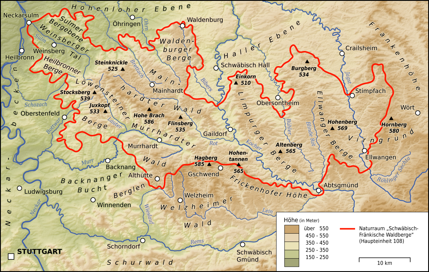 Karte des Naturraums Schwäbisch-Fränkische Waldberge (Haupteinheit 108)